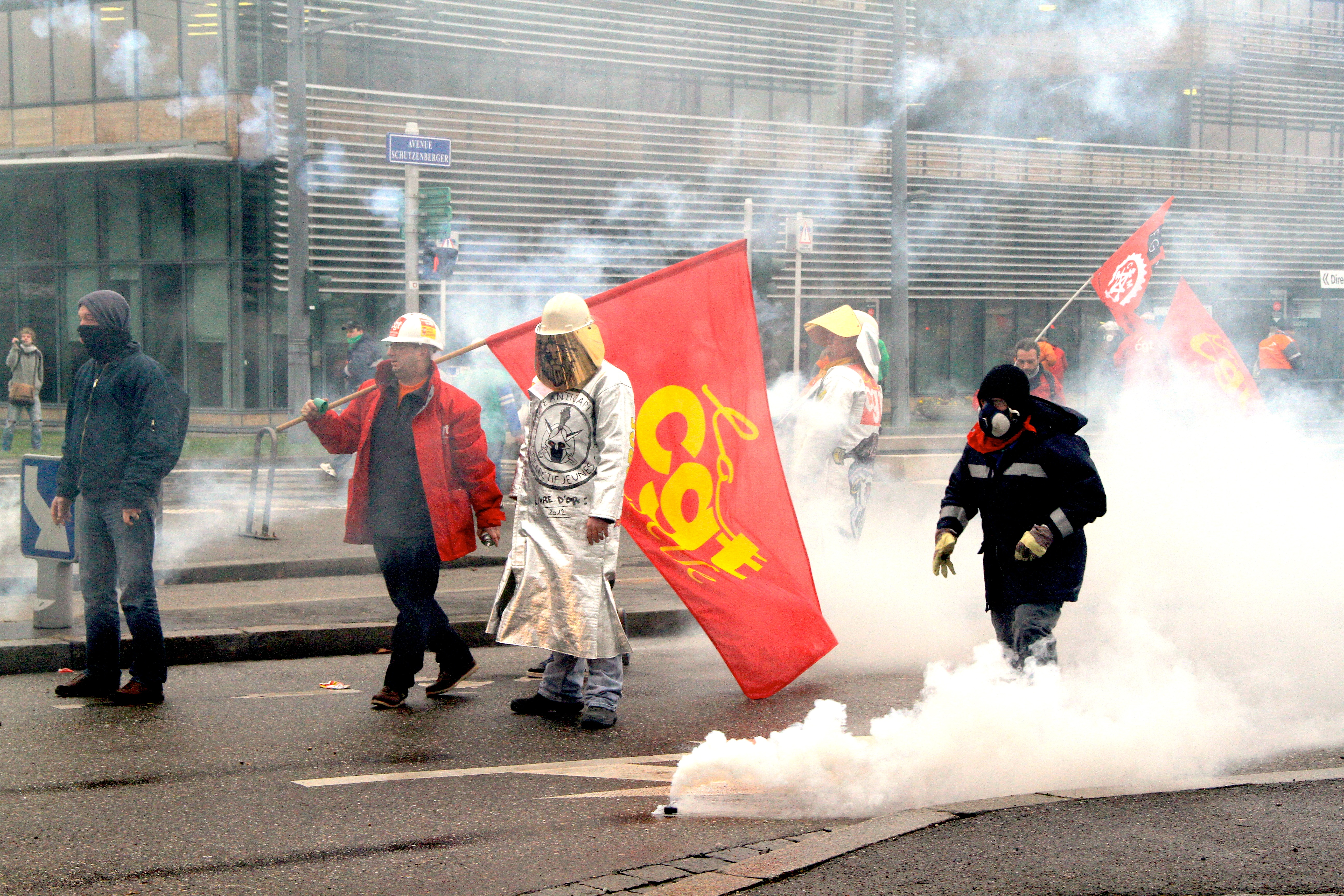 Strasbourg 6 février 2013, manifestations des ouvriers d’ArcelorMittal sur la place Adrien Zeller au Wacken.